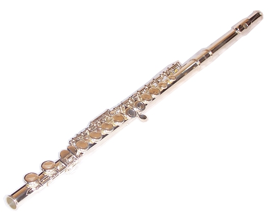 Flauto traverso